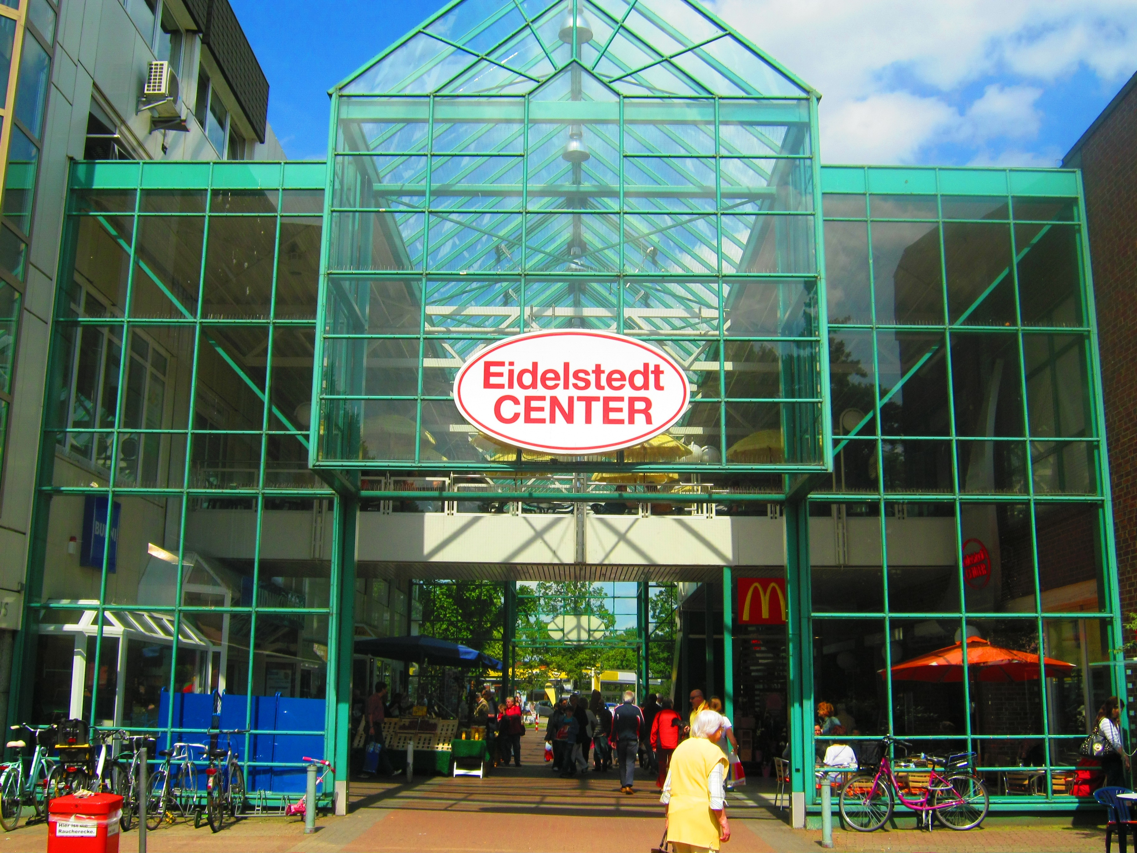 Eidelstedt Center in Hamburg-Eidelstedt.